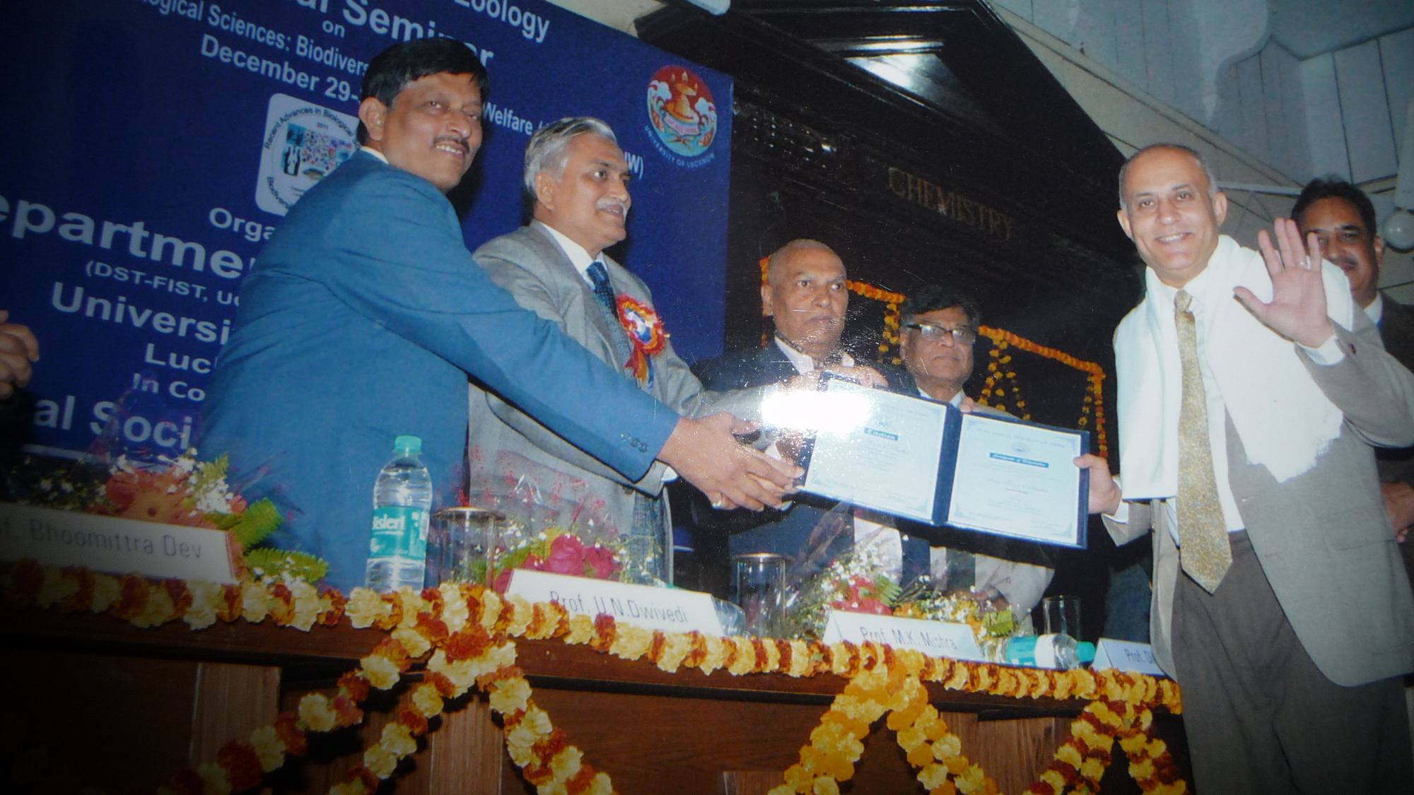 جائزة المؤتمر بجامعة لكنو